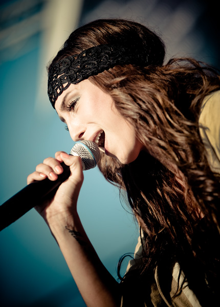 Den danske sangerinde Medina under en koncert til Karneval i Aalborg, 2009.